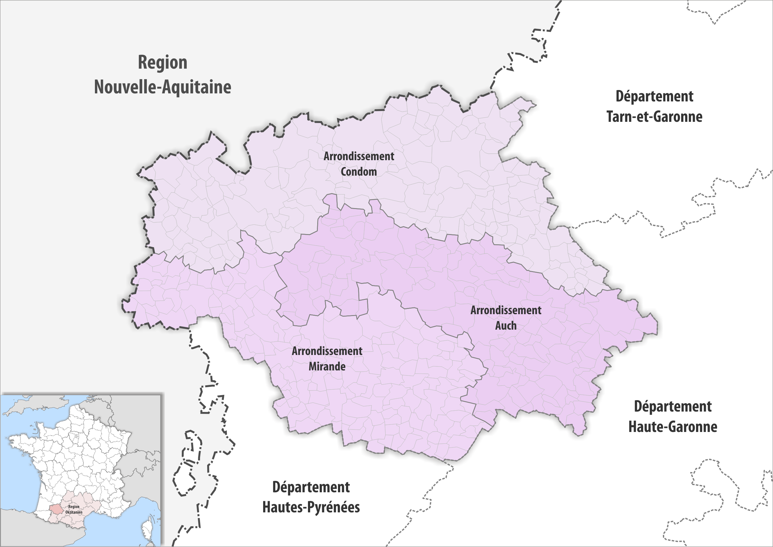 Gemeinden und Arrondissemente im Departement Gers